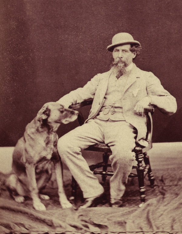 Portret Dickens